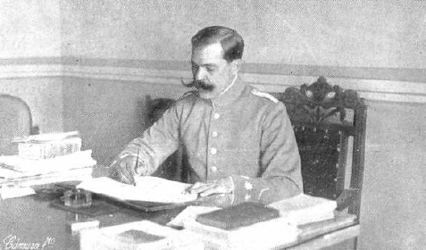 Fotografía del coronel Fernández Silvestre, jefe de las fuerzas españolas en Larache, publicada en 1913 con motivo de su ascenso a general de brigada por méritos de guerra.